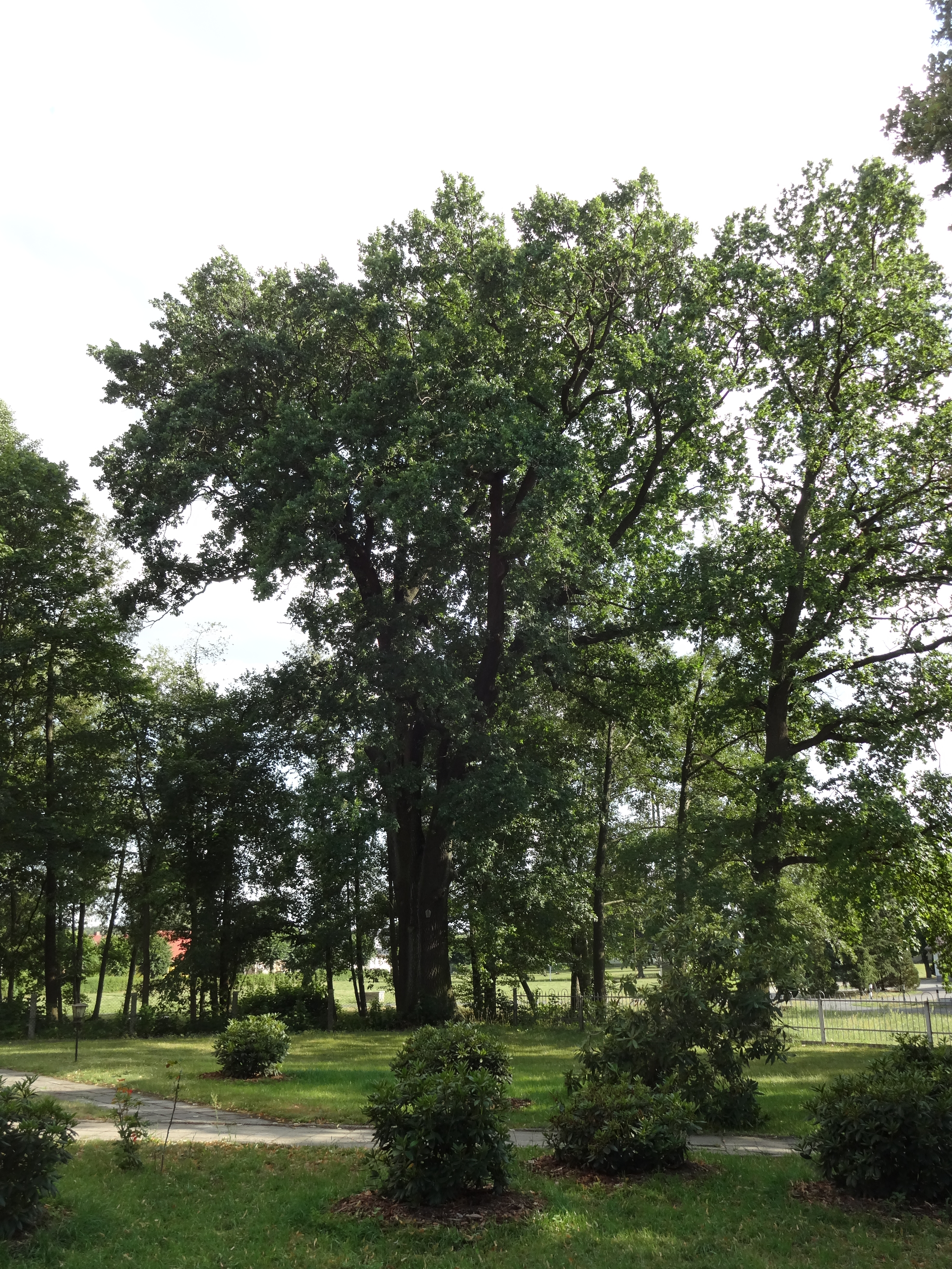 als Naturdenkmal geschützte Stieleiche am Kirchenzaun in Bronkow